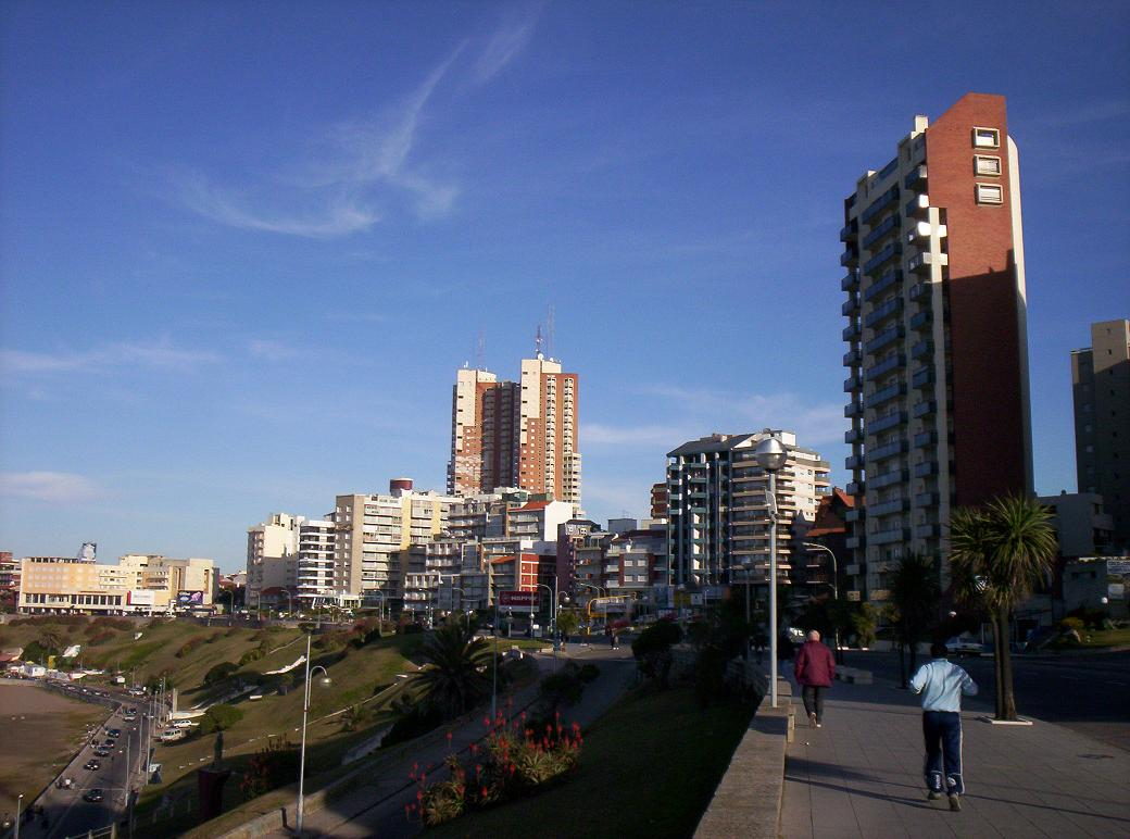 Boulevard Marítimo, Mar del Plata.